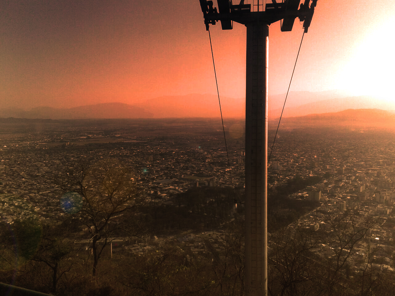 Teleferico San Bernardo